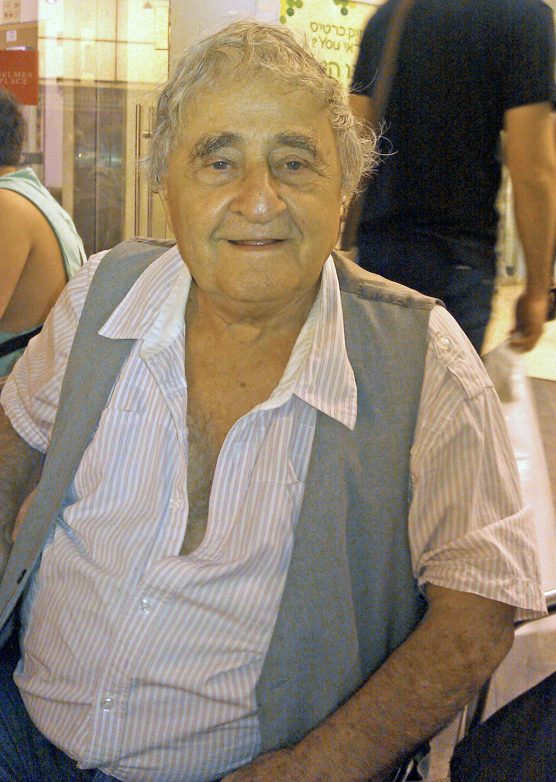 יעקב בן-סירא